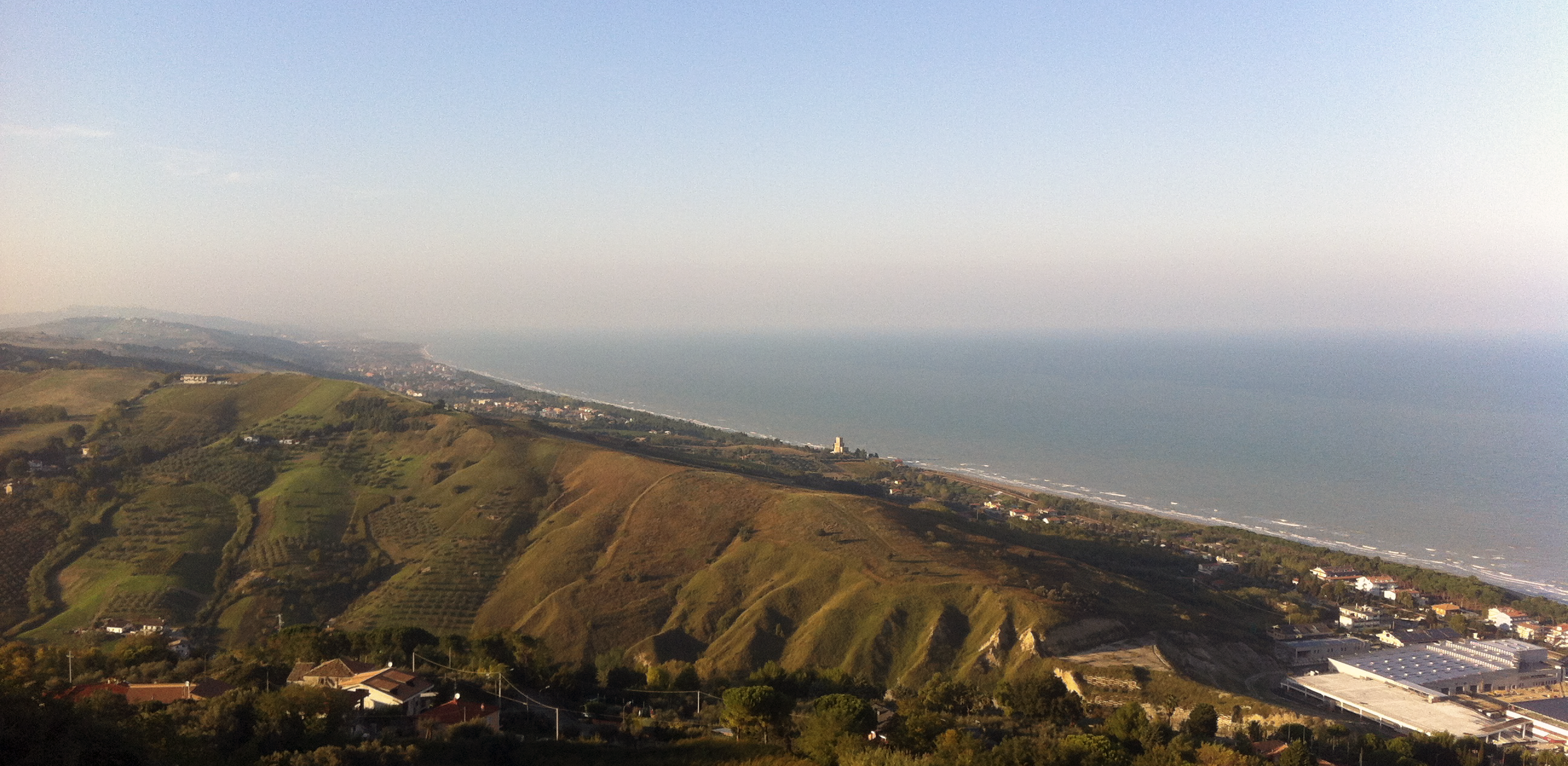 Pineto e Torre di Cerrano viste da Silvi Paese (da sud)